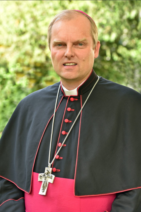 Offizielles Portrait von Weihbischof Florian Wörner auf dem Bildchen zu seiner Bischofsweihe 2012